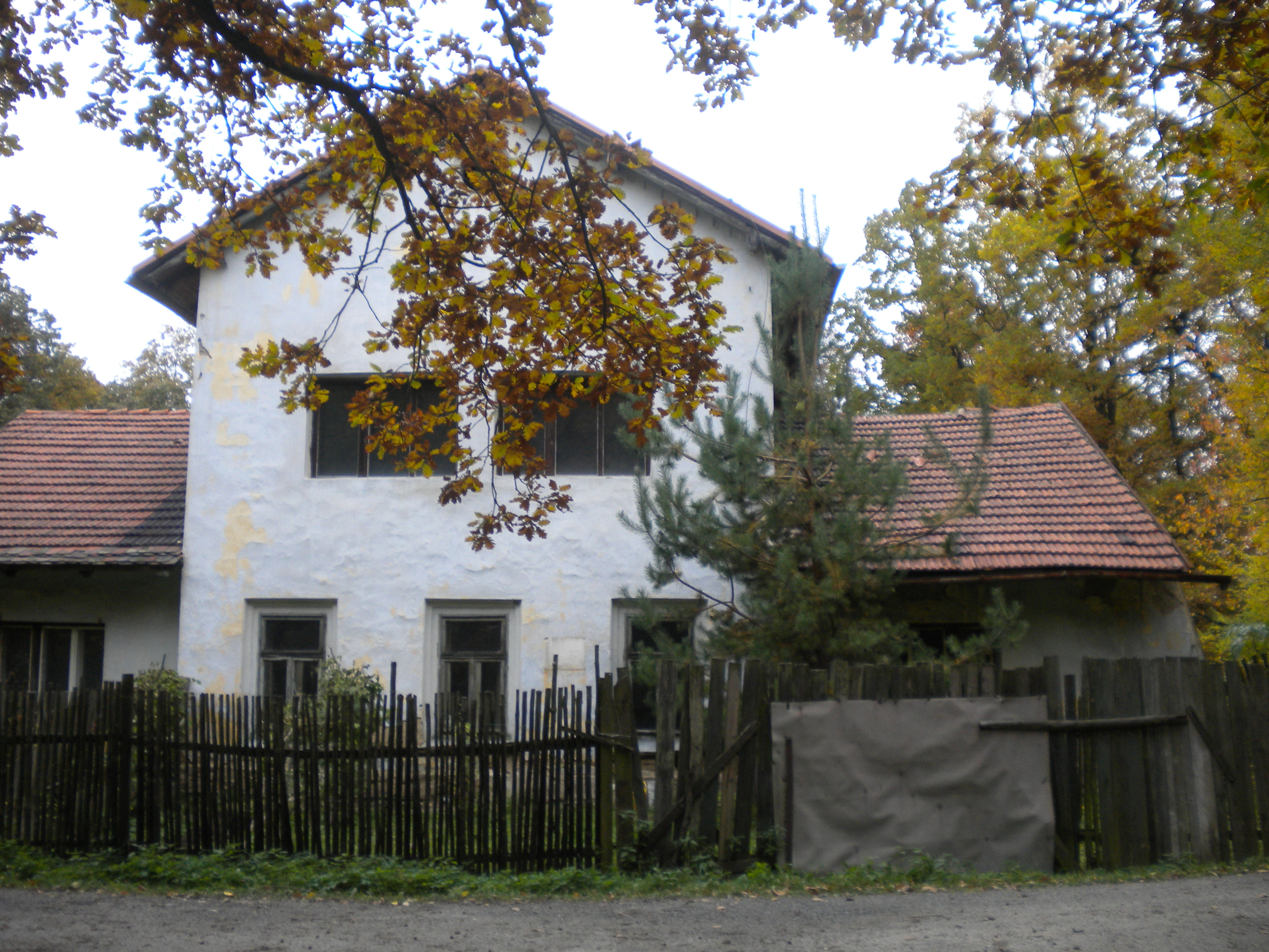 Hájovna ve středu Xaverovského háje, Praha-Dolní Počernice.